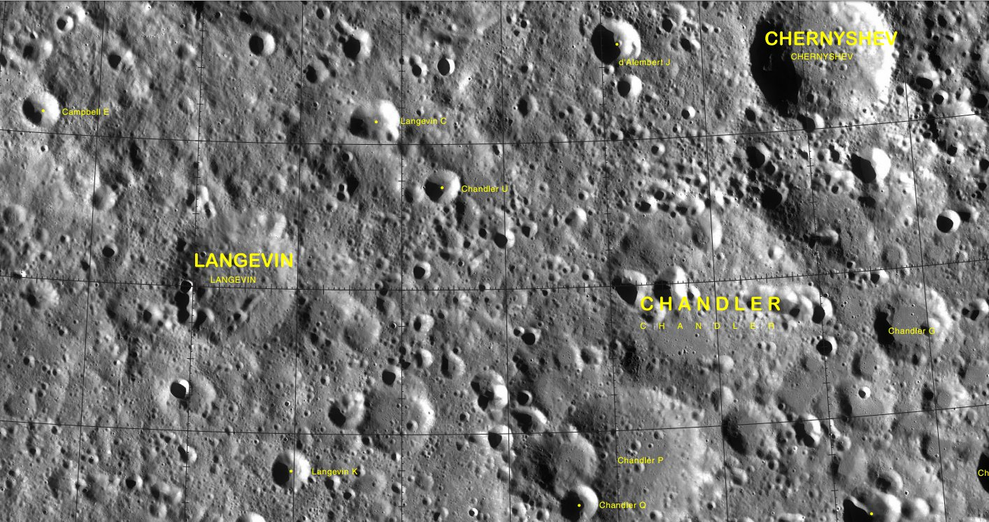 Cráter Chernyshev